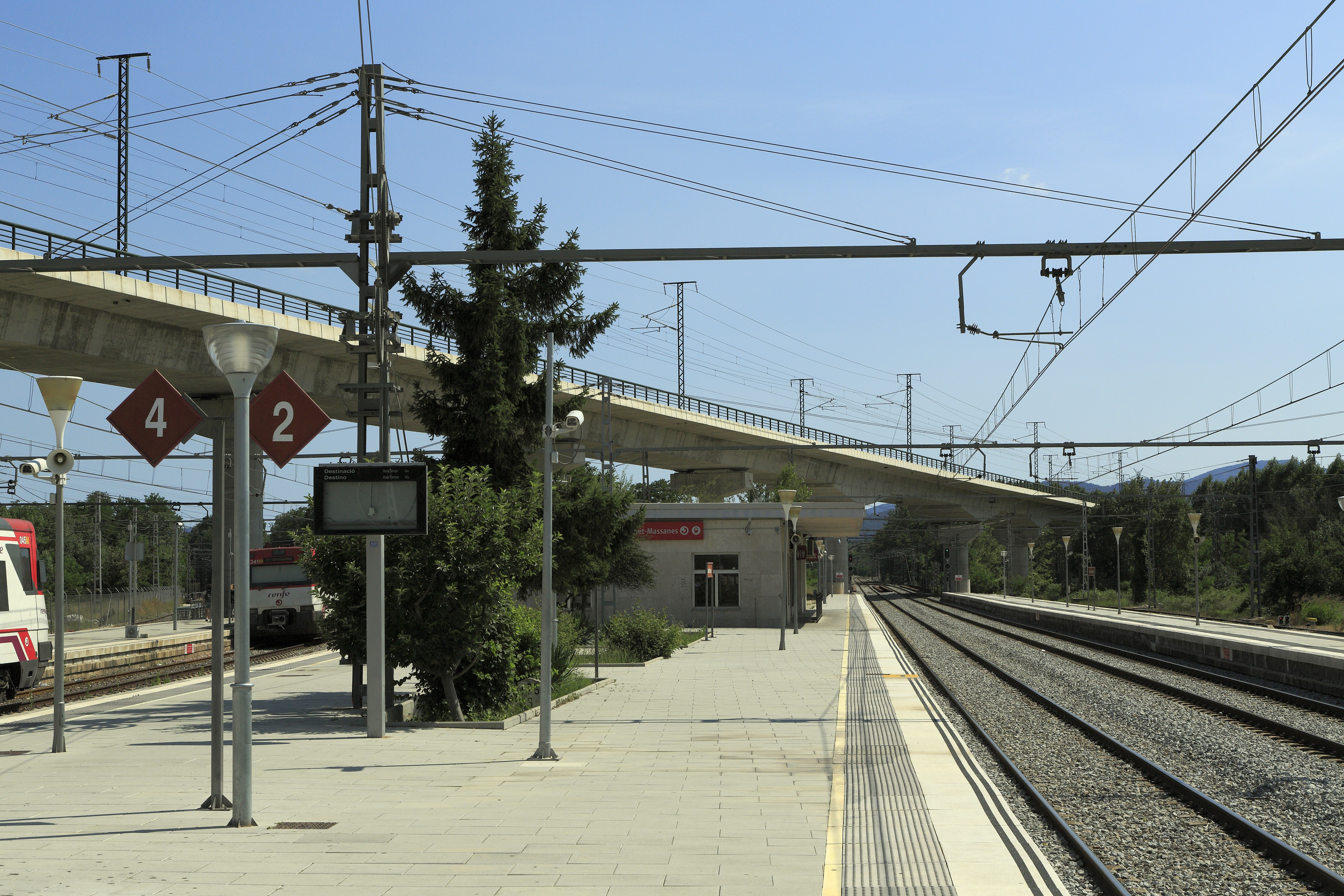 Richtung Barcelona, darüber die Schnellfahrstrecke Madrid–Barna–Frankreich. Die Triebzüge links sind hier wendende Einheiten der Linie R2 über die Bahnstrecke Barcelona–Mataró–Maçanet-Massanes.